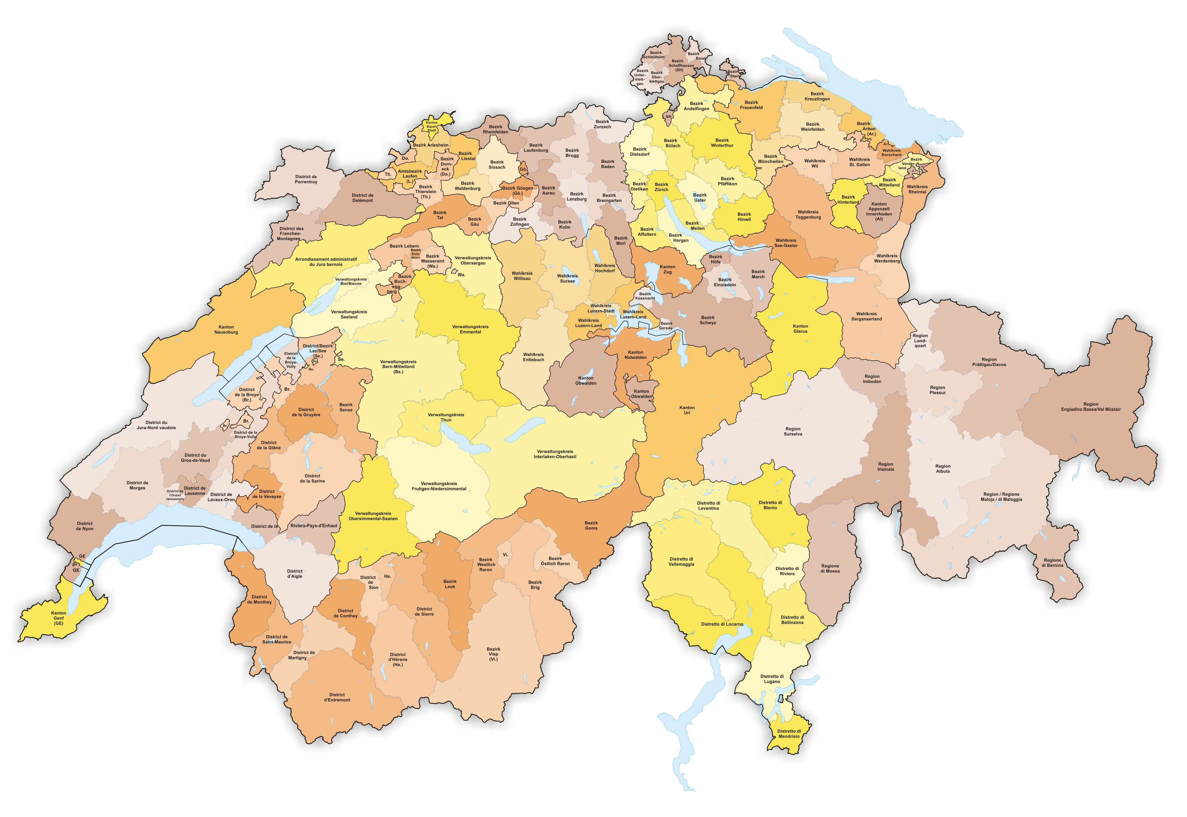 Districts in Switzerland